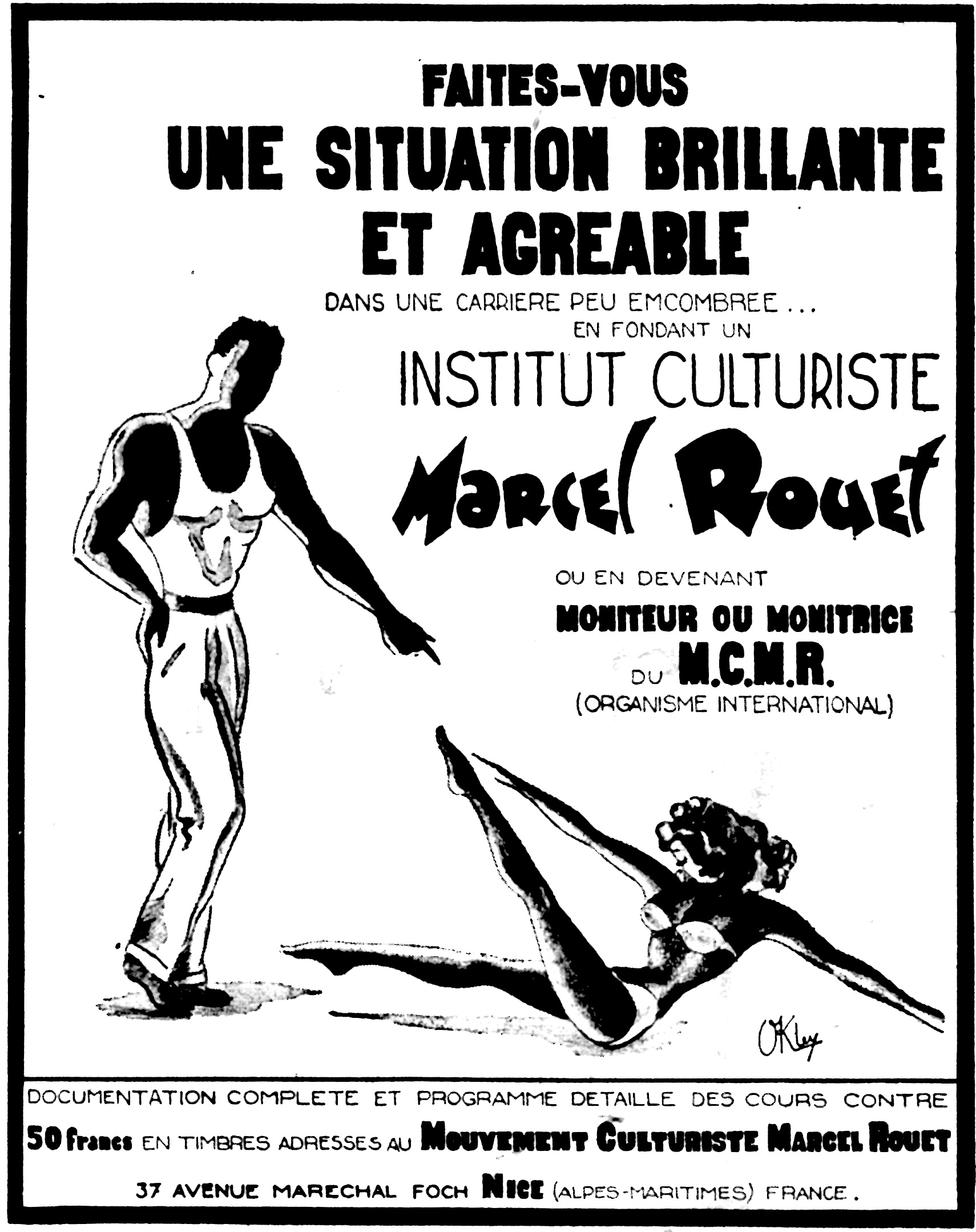 Affiche concernant le M.C.M.R international